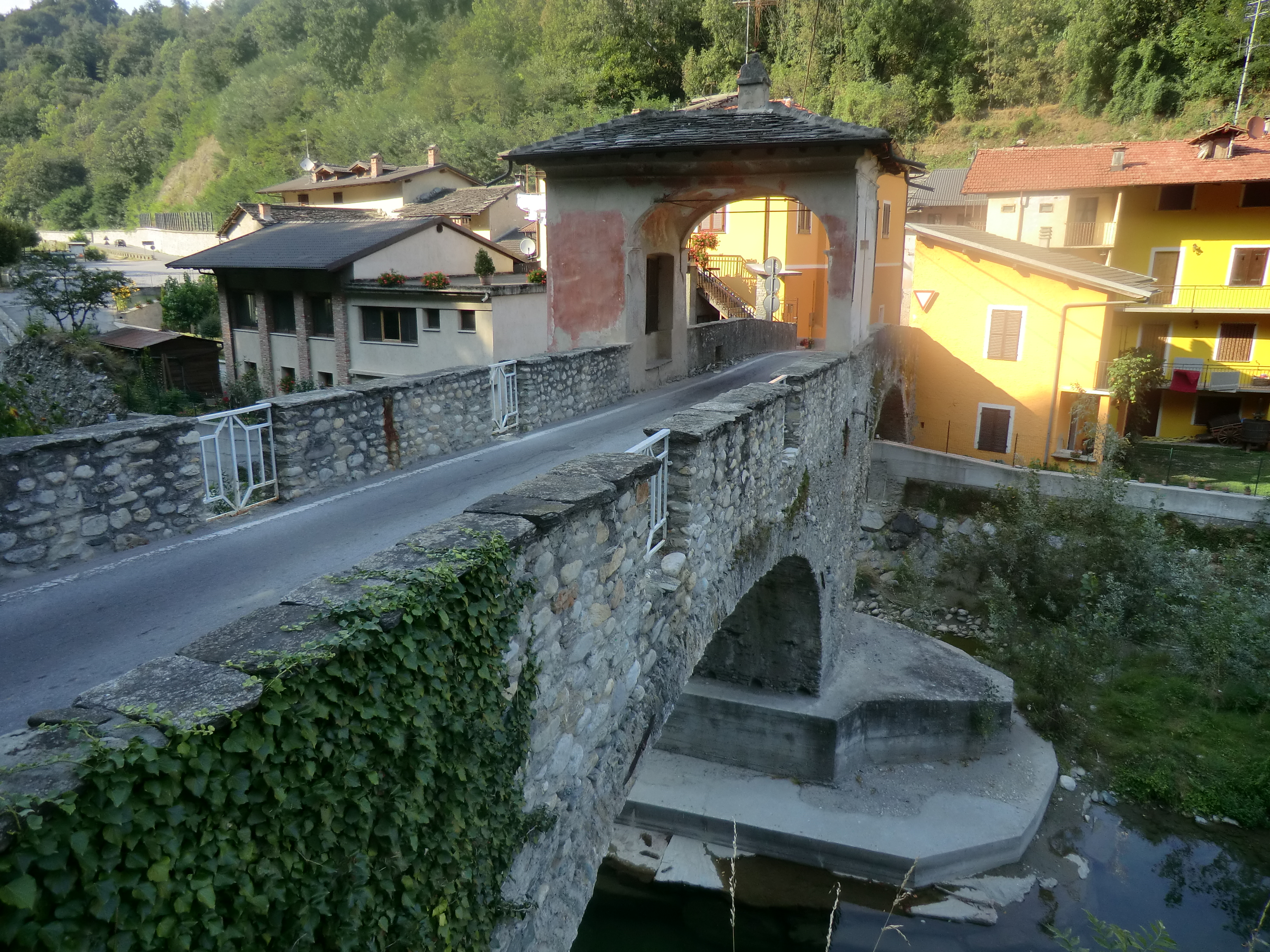 Cartignano: ponte sul Maira (1800 circa) e cappella votiva (1835)